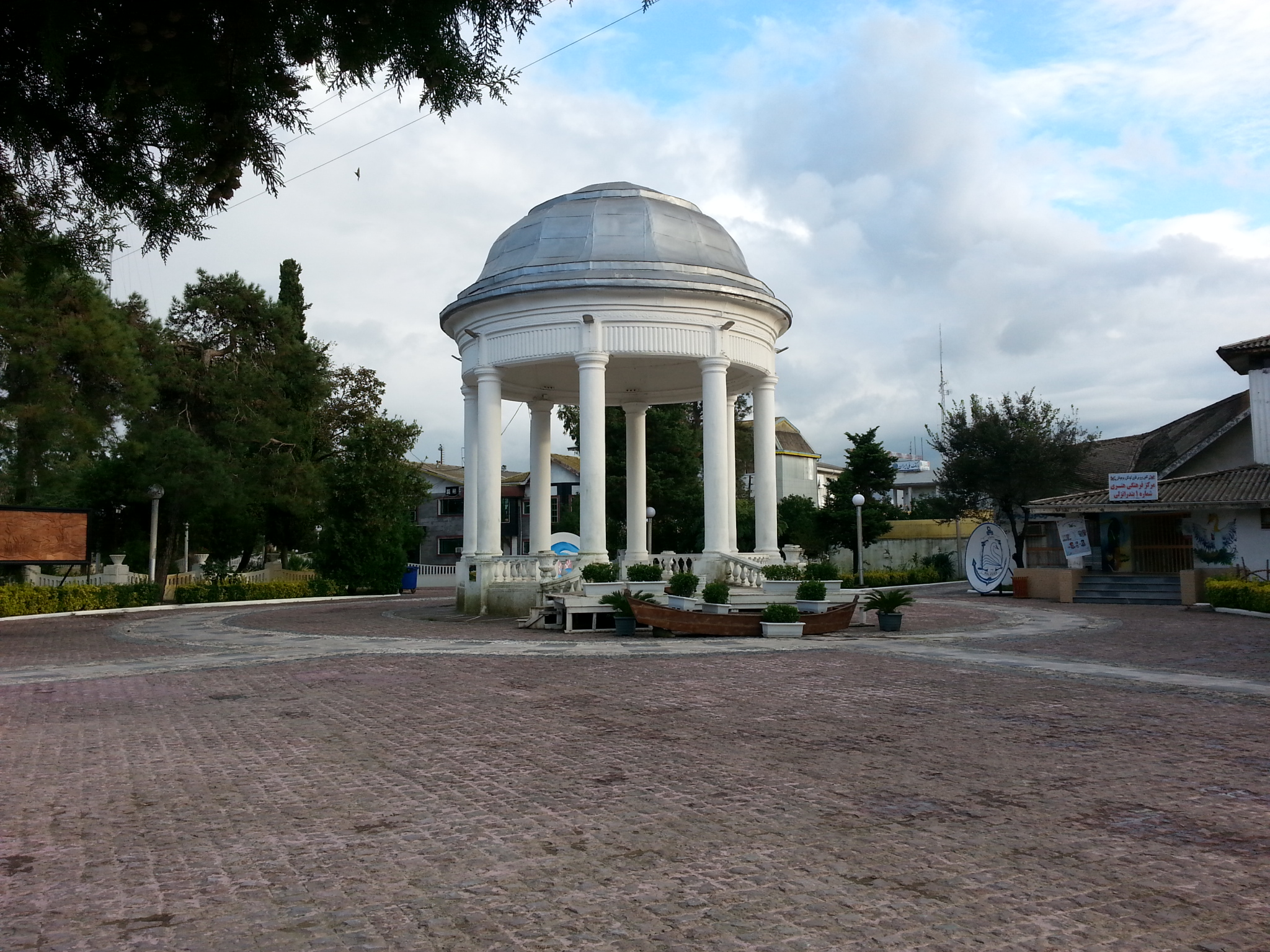 ساختمان موزیک